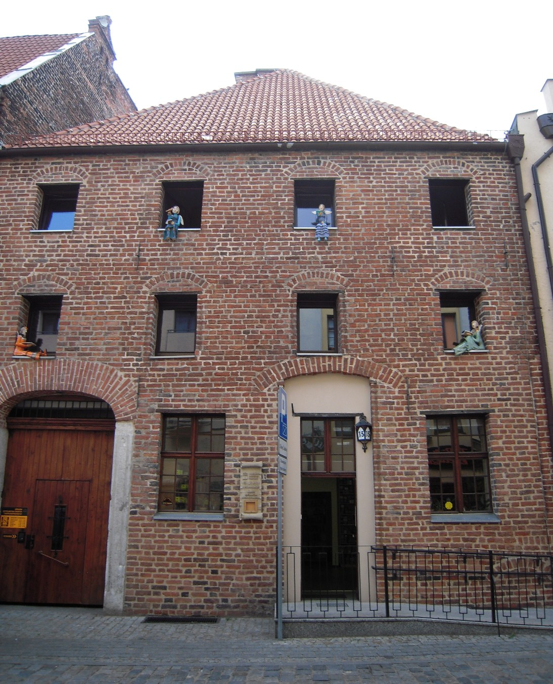 Toruń, ul. Szczytna 13 - kamienica, XIV, XVIII, XIX w. (zabytek nr A/279)